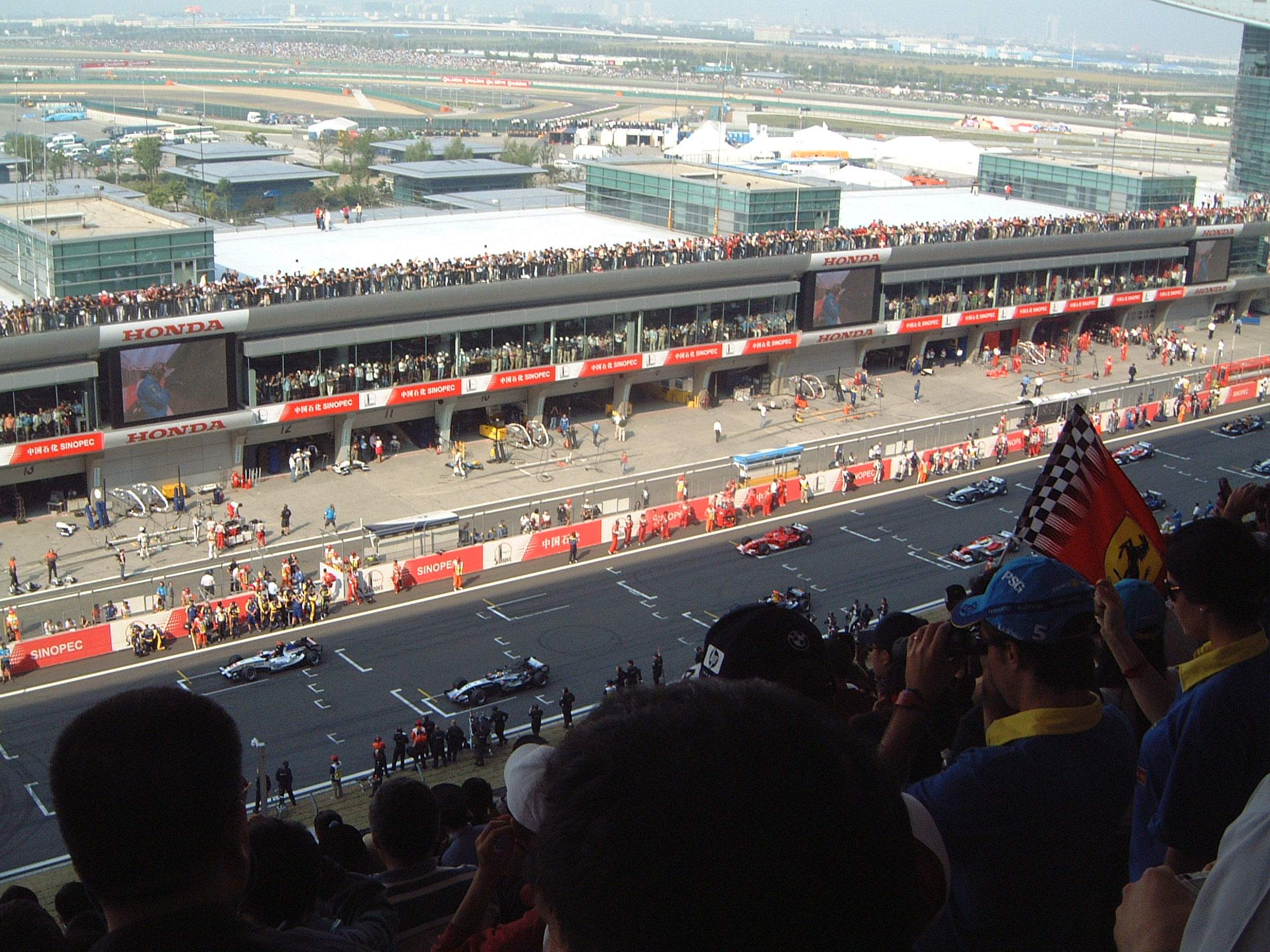 Formula 1 Circuit (Shanghai)